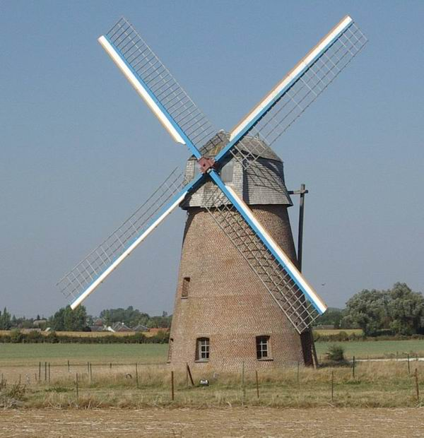 Le Moulin de Saint-Vaast.Photo prise par J-C HOUDOT.